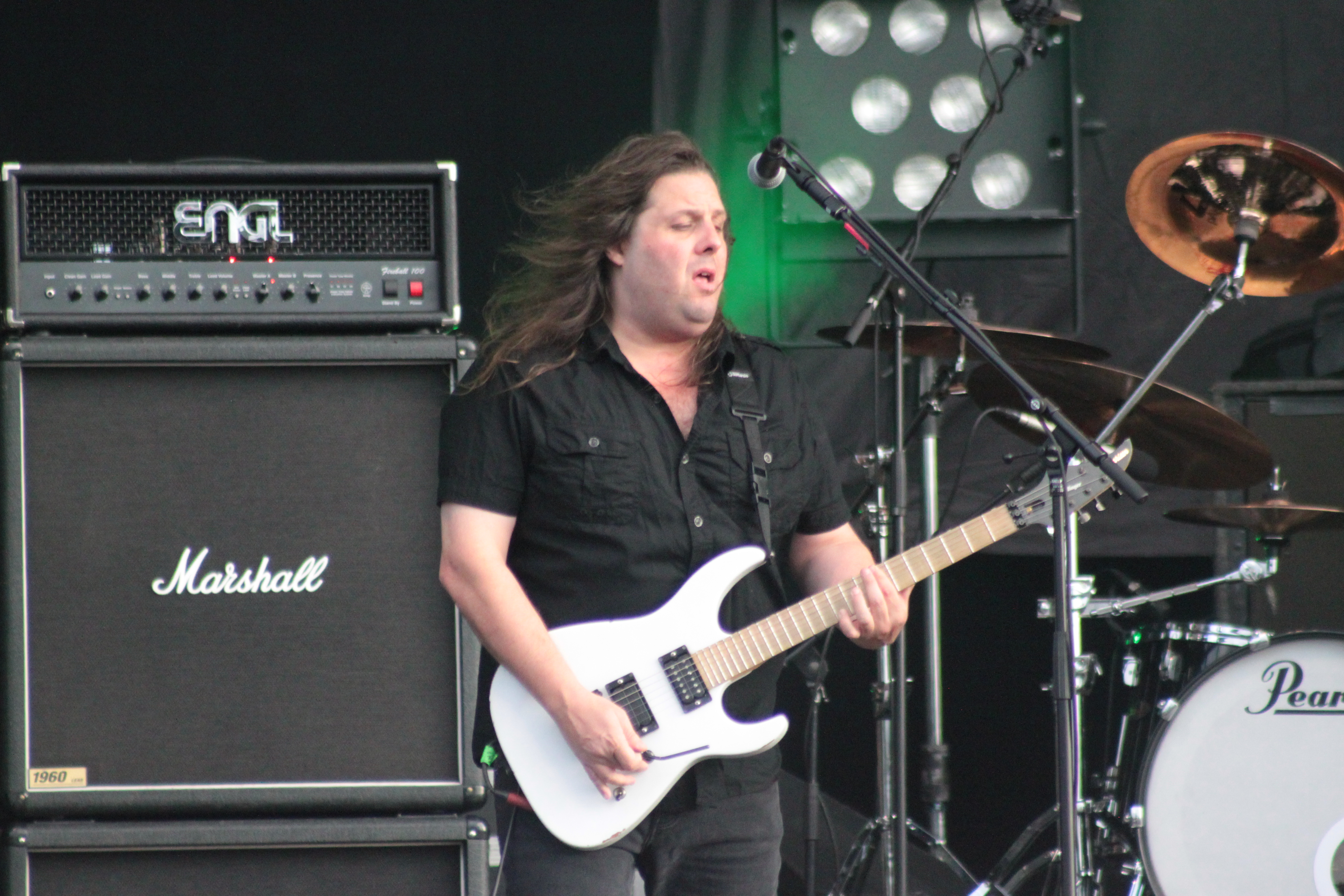 Michael Romeo, Symphony X, Hellfest 2013, Fr-44-Clisson.